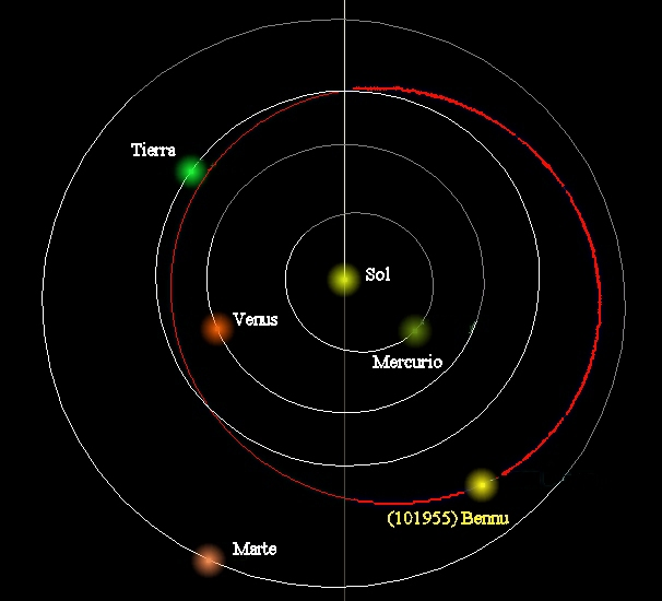 Órbita del asteroide (101955) Bennu